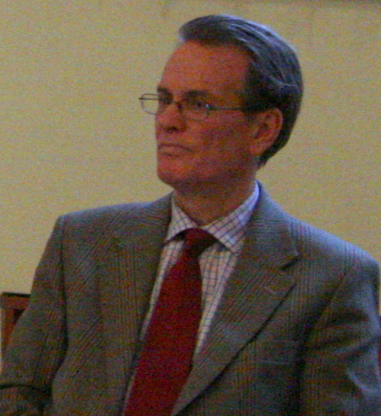 Ioan Onisei, Răsvan Popescu, Christian Mititelu